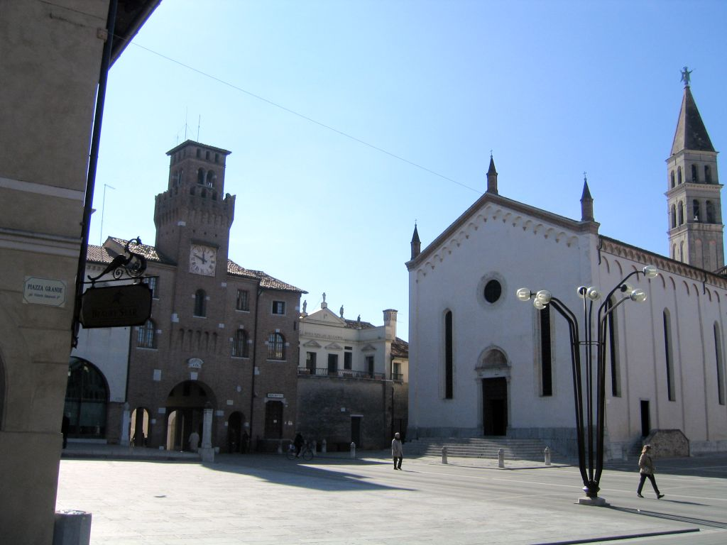 Oderzo, Piazza GrandeOderzo, Piazza Grande